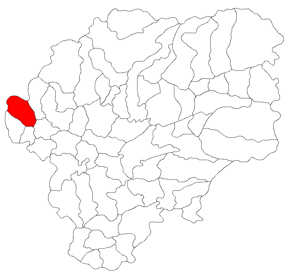 Categorie:Hărţi ale judeţului Bistriţa-Năsăud